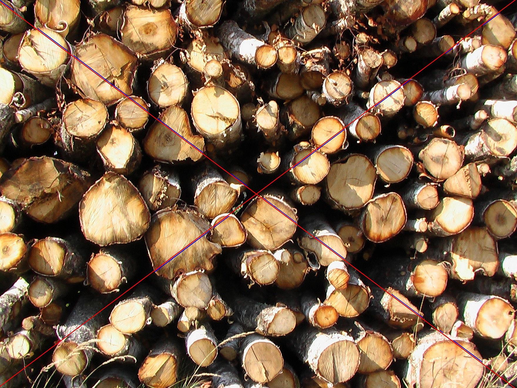 See pilt illustreerib virnatäiuse koefitsiendi määramist diagonaalide meetodil. Punasega - diagonaalid Sinisega - otspindadelt mõõdetud kõõlud